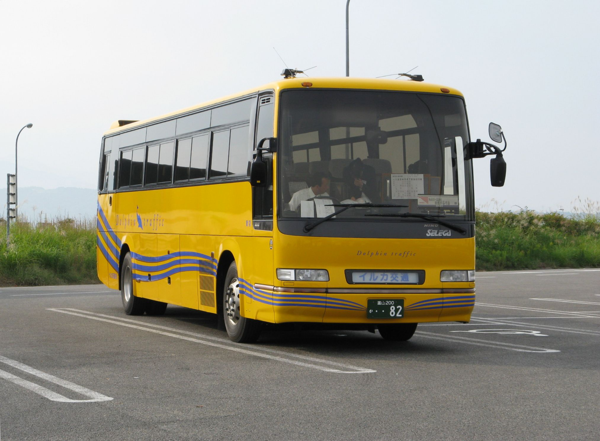 イルカ交通の貸切バス 日野・セレガ 入善PAにて